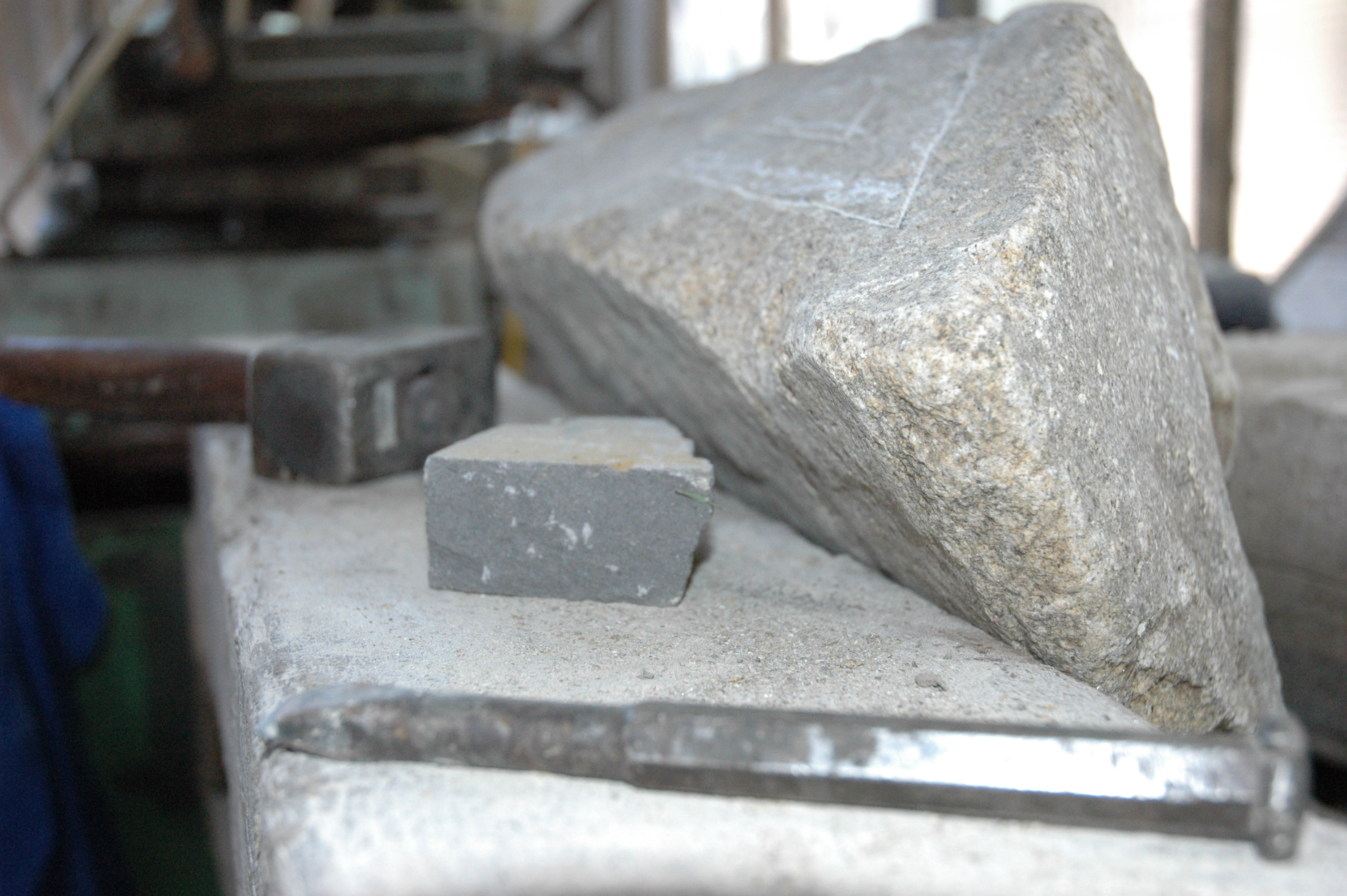 Une vue de intérieure de l'atelier